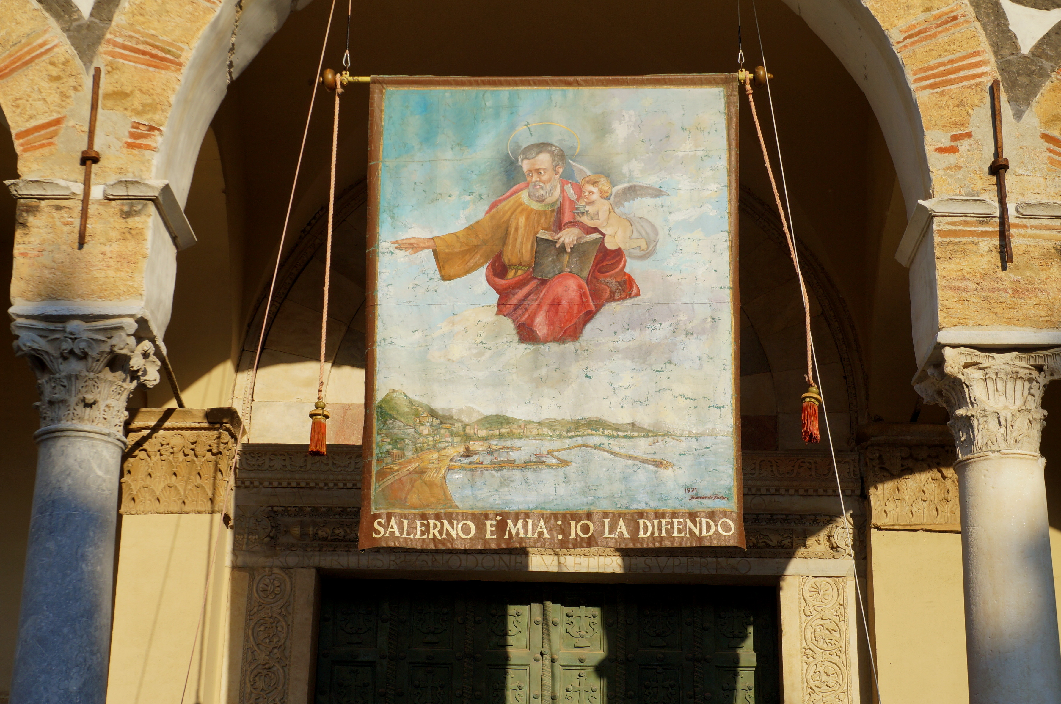 Cattedrale di Salerno, Italia.